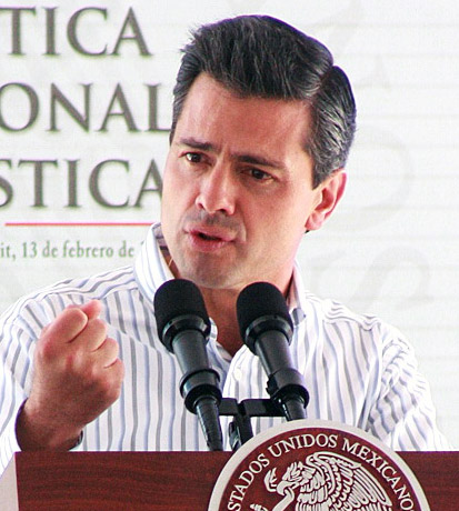 Acompaña el Gobernador Electo de Jalisco, Jorge Aristóteles Sandoval, al Presidente de México, Enrique Peña Nieto en su visita a Bahía de Banderas